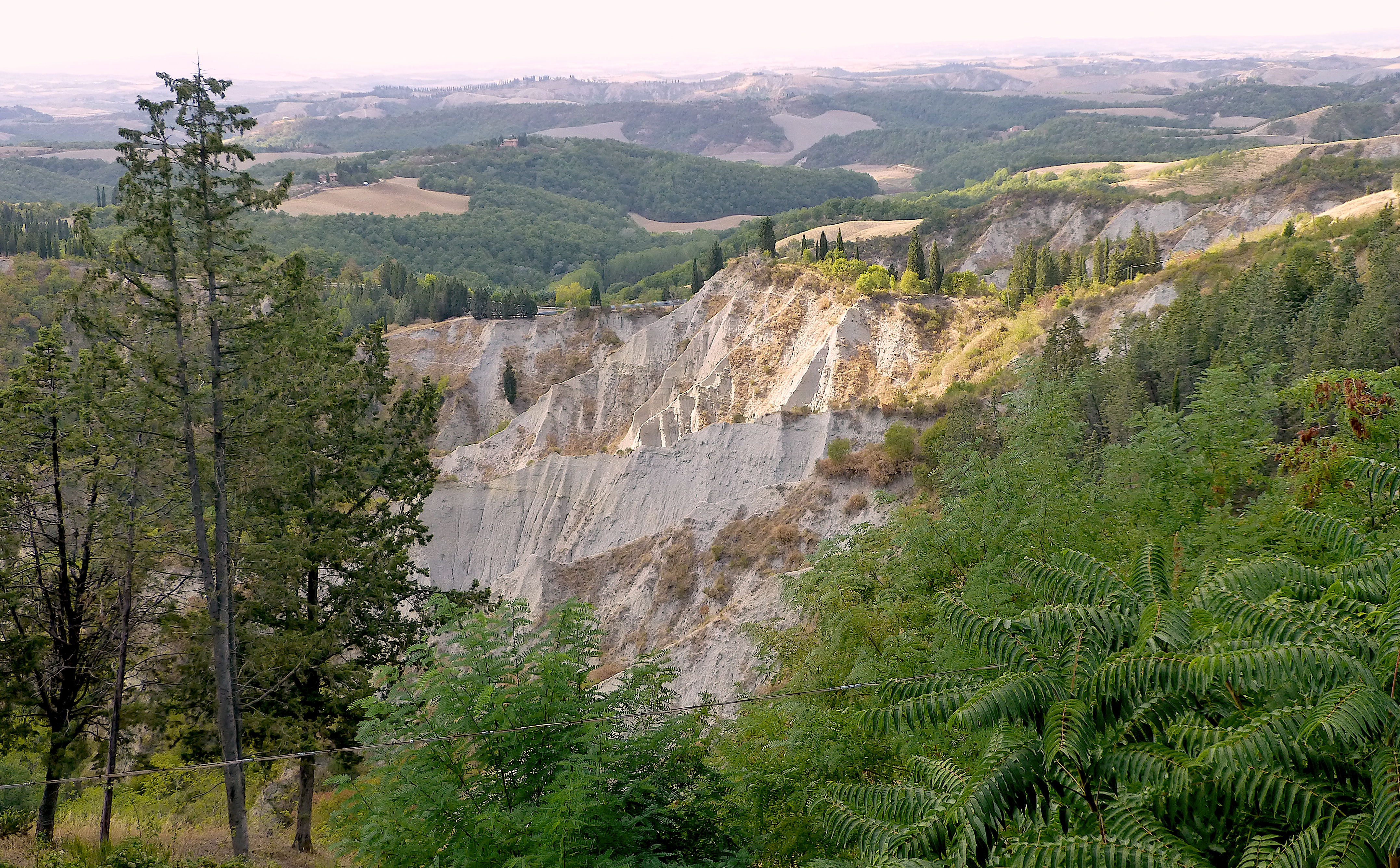 view from Chiusure of the gully side just upslope of Monte Oliveto